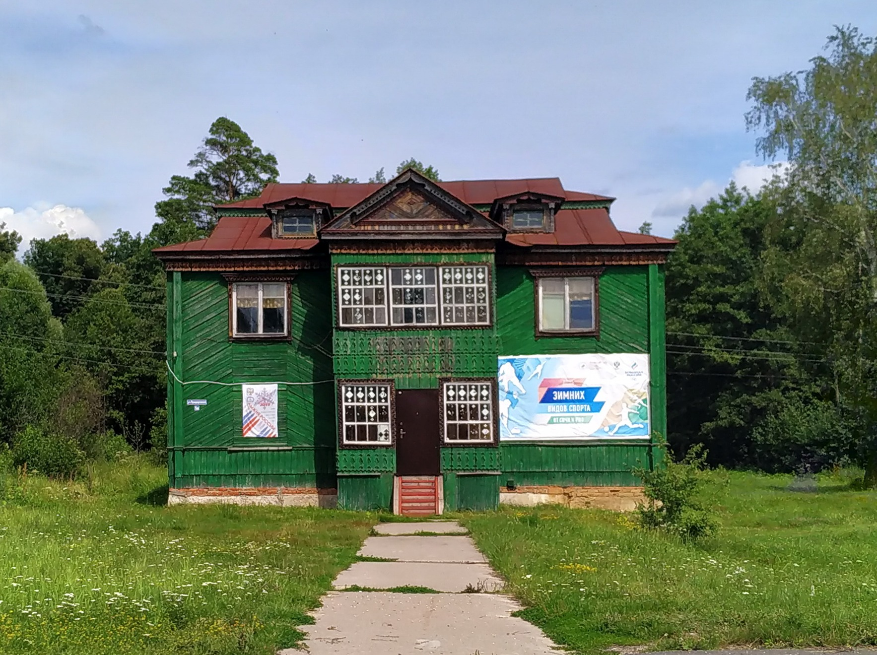 посёлок Октябрьский, Ардатовский район Мордовии, Россия